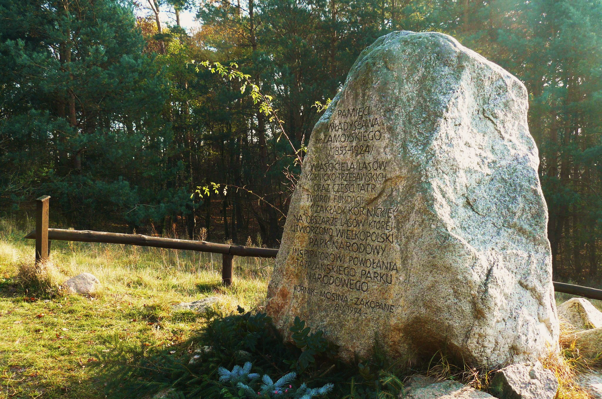 Głaz Zamojskiego - Osowa Góra.